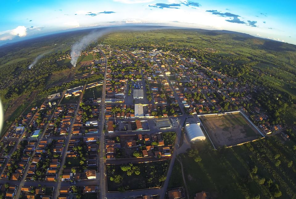 Tabocas